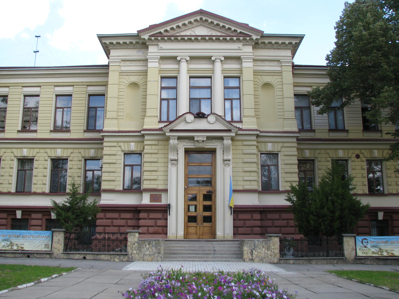 Будівля окружного суду, Херсон, Леніна вул., 9